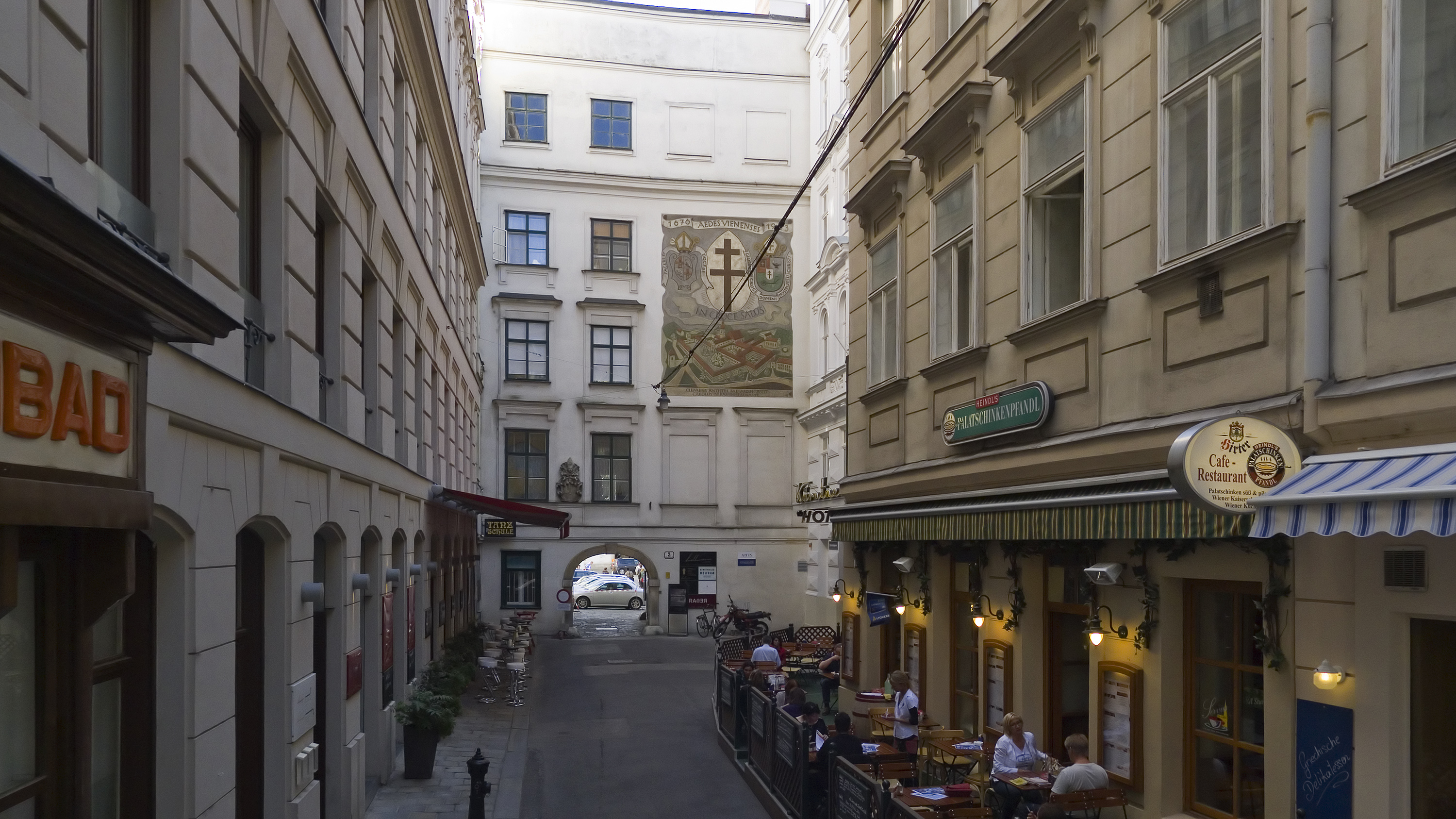 Grashofgasse in Wien 1 bei Nr. 1 Richtung Südosten